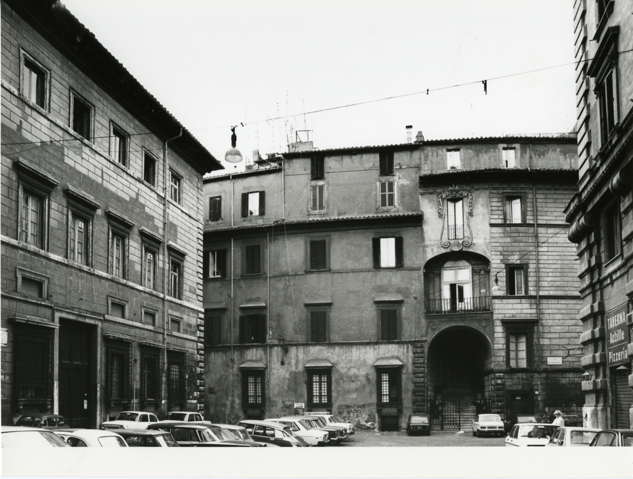 Roma, palazzi Cenci Taviani a piazza Cenci. Servizio fotografico : Roma, 1979 / Paolo Monti. - Stampe: 6 : Positivo b/n, gelatina bromuro d'argento/ carta, 24x30. - ((Al verso delle stampe manoscritto numero di negativo corrispondente: 3292/6, 3292/10, 3292/14, 3292/32. Sul coperchio della scatola manoscritto a pennarello nero: "Roma/ Città storiche". - Occasione: Documentazione per la ubblicazione: Fumagalli, Alberto "Mirabilia Romae: il centro storico nell'arte attraverso i secoli", Milano Cariplo 1979. - Fonte: Agenda di Paolo Monti: Nikon Leika 3001-/ Monti 1978 (1978-1982), presso Archivio Paolo Monti. - Fonte: Fattura di Paolo Monti: IV. Commesse/ Fattura n. 17/ Fotografie centro storico di Roma per Cariplo (1979/06/11), presso Archivio Paolo Monti. - Fonte: Monografia di Fumagalli, Alberto: Mirabilia Romae: il centro storico nell'arte attraverso i secoli, Milano, Cariplo (1979)